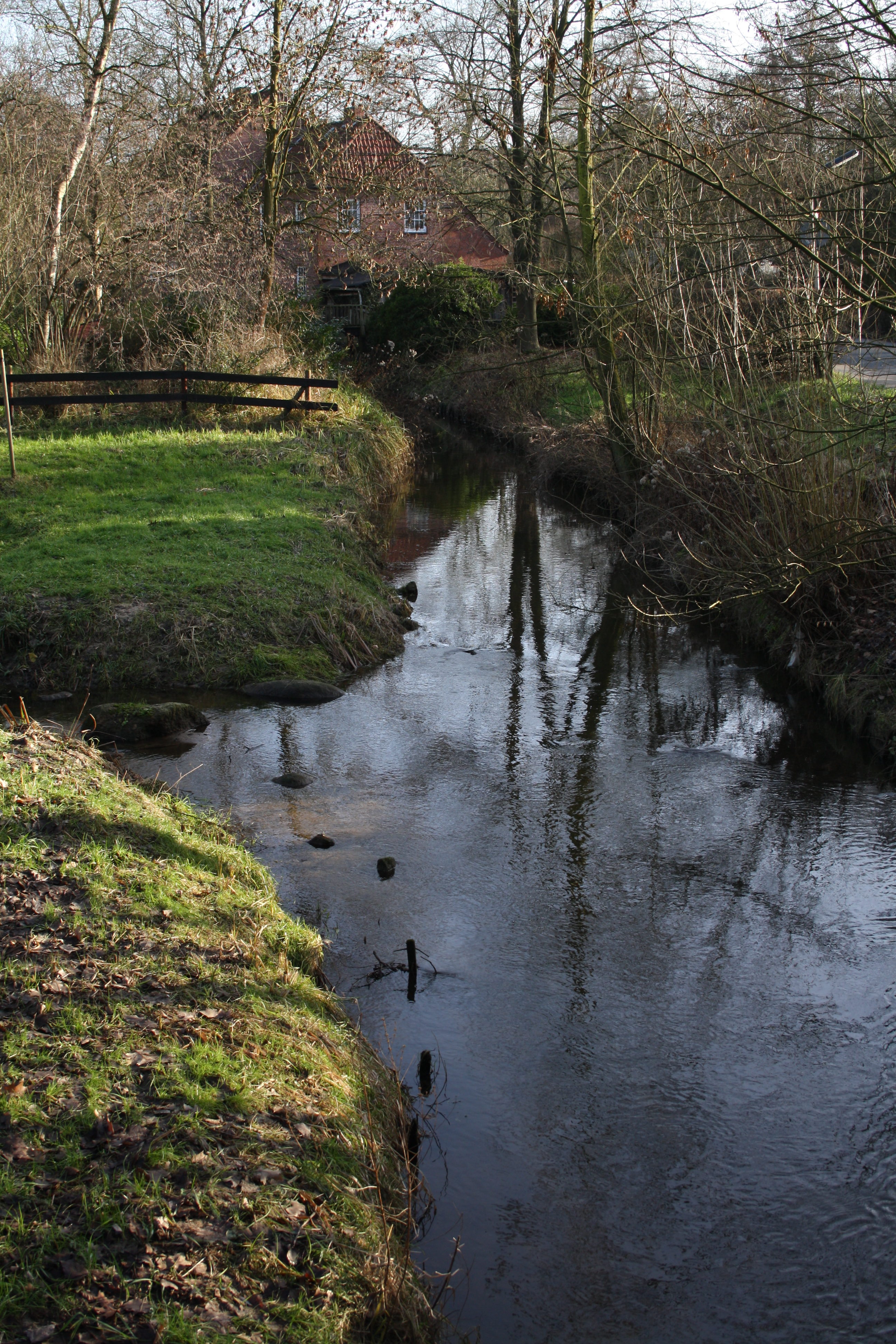 Die Schönebecker Aue (Bremen) von der Brücke unterhalb des Stauwehres am Schloss Schönebeck. Unten links im Bild ist die Einmündung des Umgehungsgerinnes zu sehen, im Hintergrund das Gebäude der alten Wassermühle.